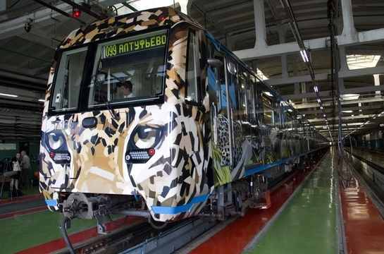 Электропоезд метро 81-760/761 "Полосатый экспресс-2" в депо. Вагон 37166 с изображением леопарда